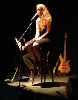 רויטל זלצמן במופע שירי חוה אלברשטיין